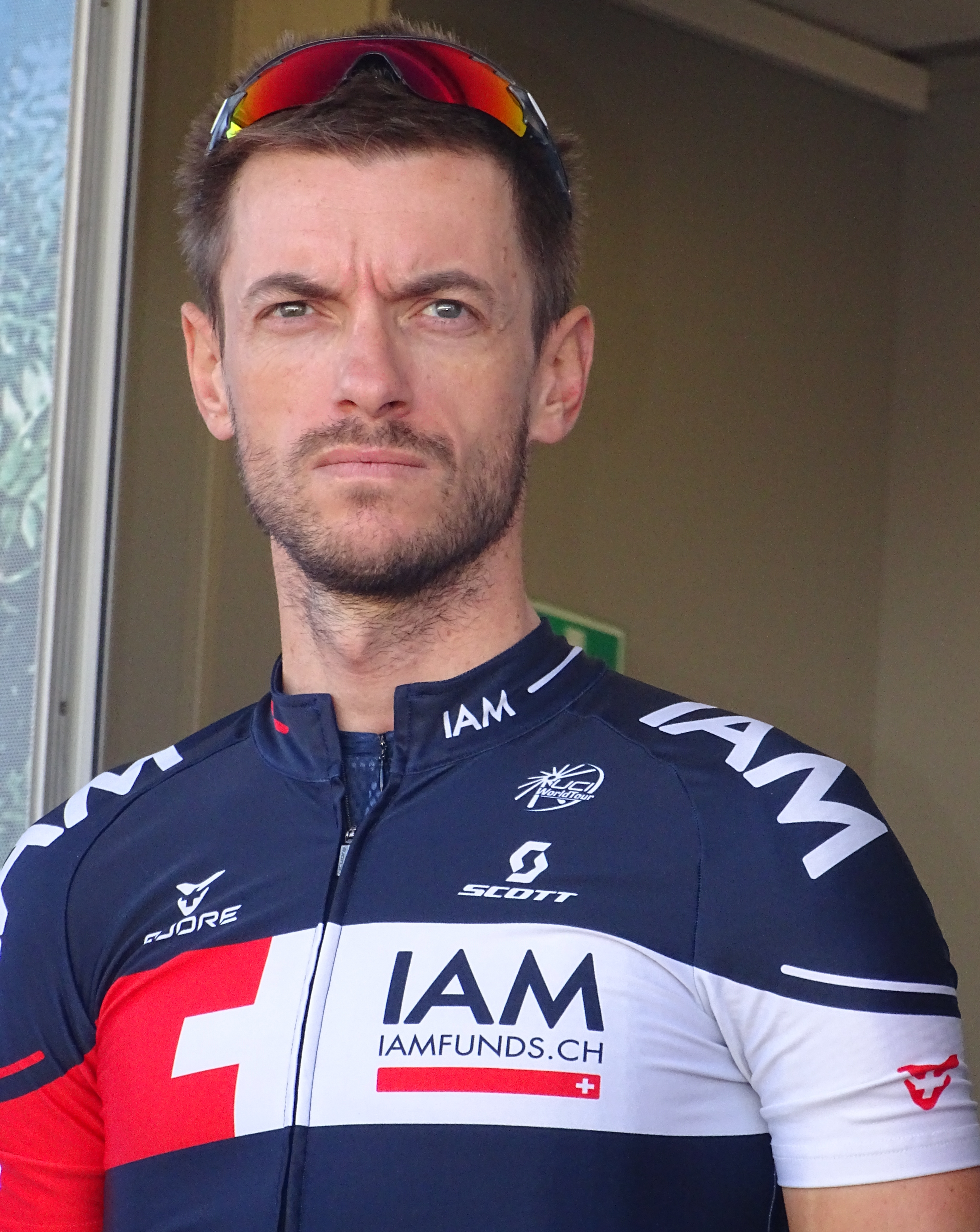 Reportage réalisé le dimanche 20 septembre à l'occasion du départ et de l'arrivée du Grand Prix d'Isbergues 2015 à Isbergues, Nord-Pas-de-Calais, France.